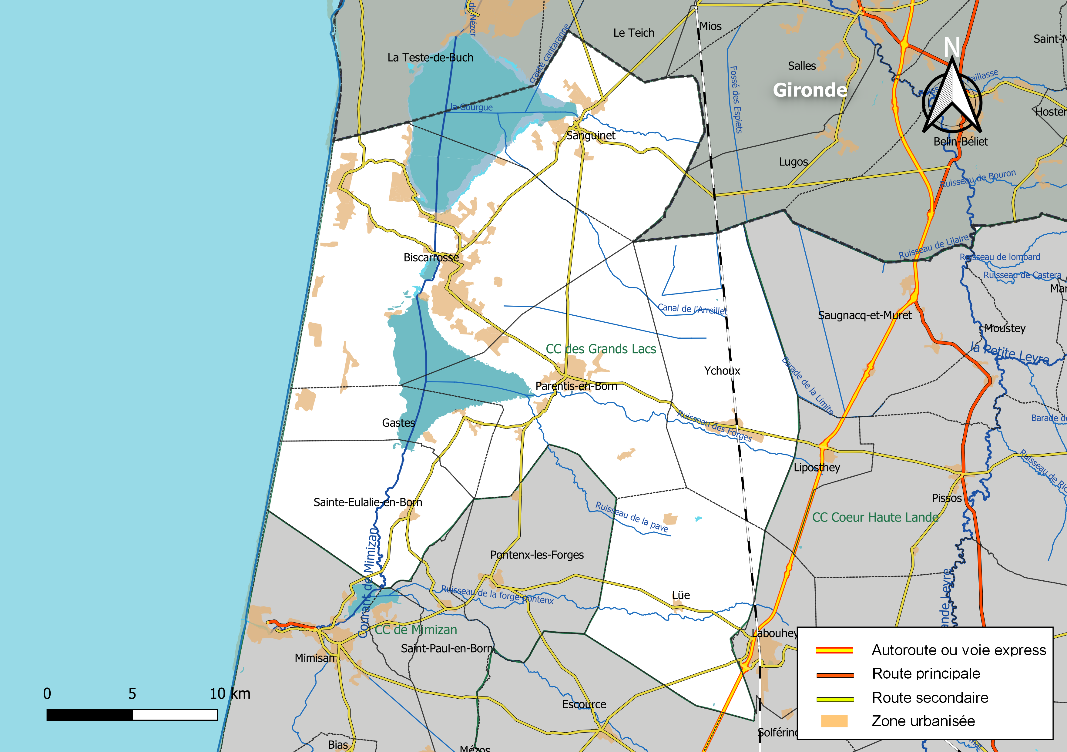 Carte géographique de la Communauté de communes des Grands Lacs, département des Landes, France. Composition au 1er janvier 2019.